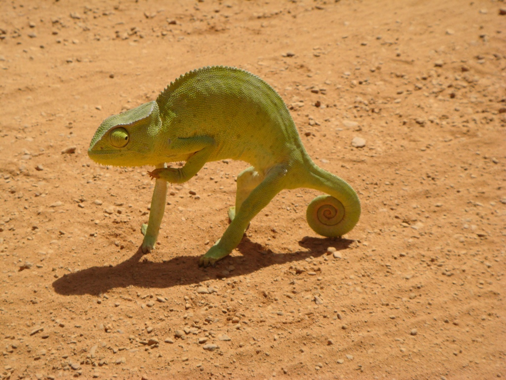 Kamæleon, Togo